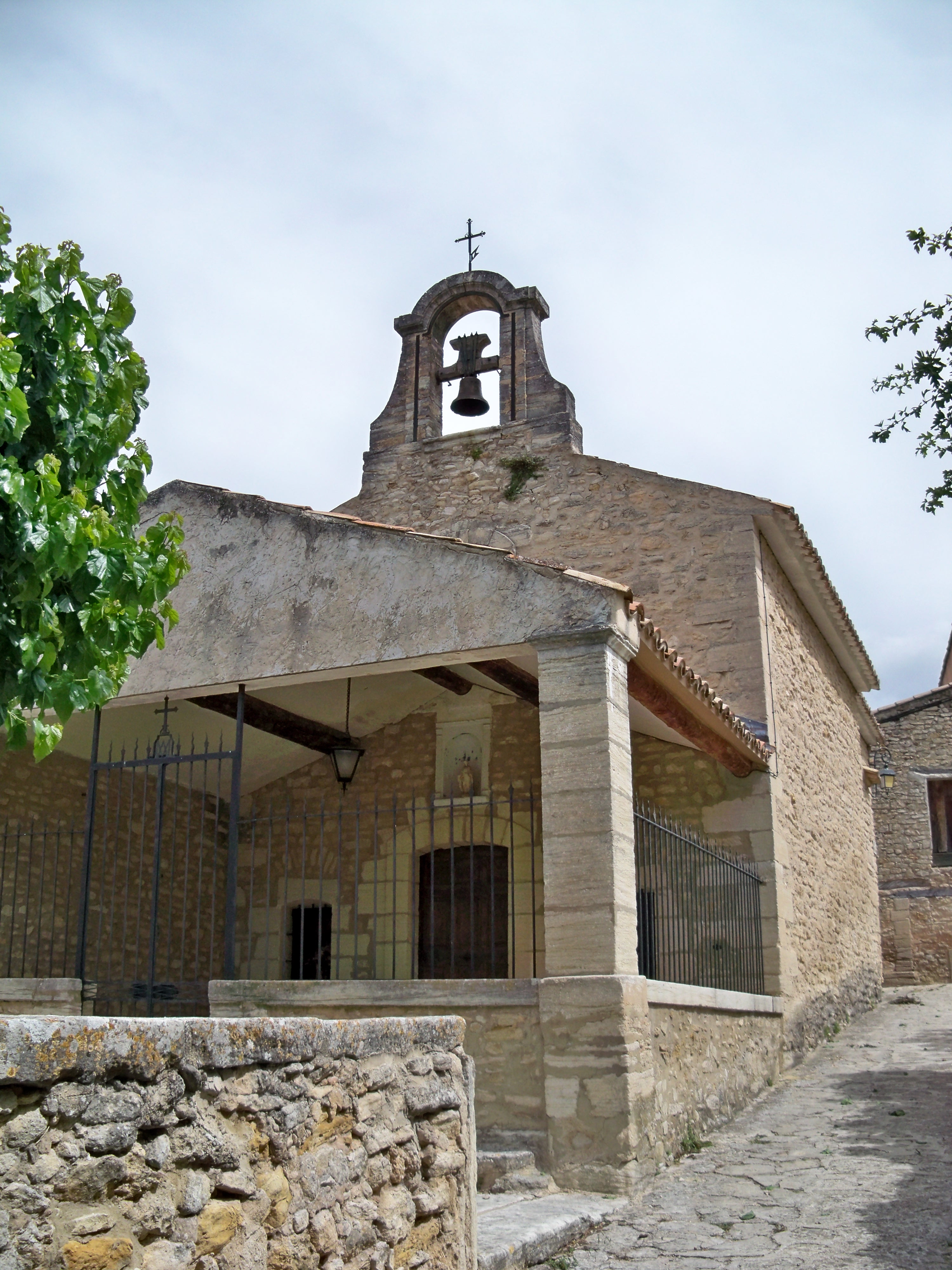 Chapelle Notre Dame des Acces, Crillon le Brave, Vaucluse